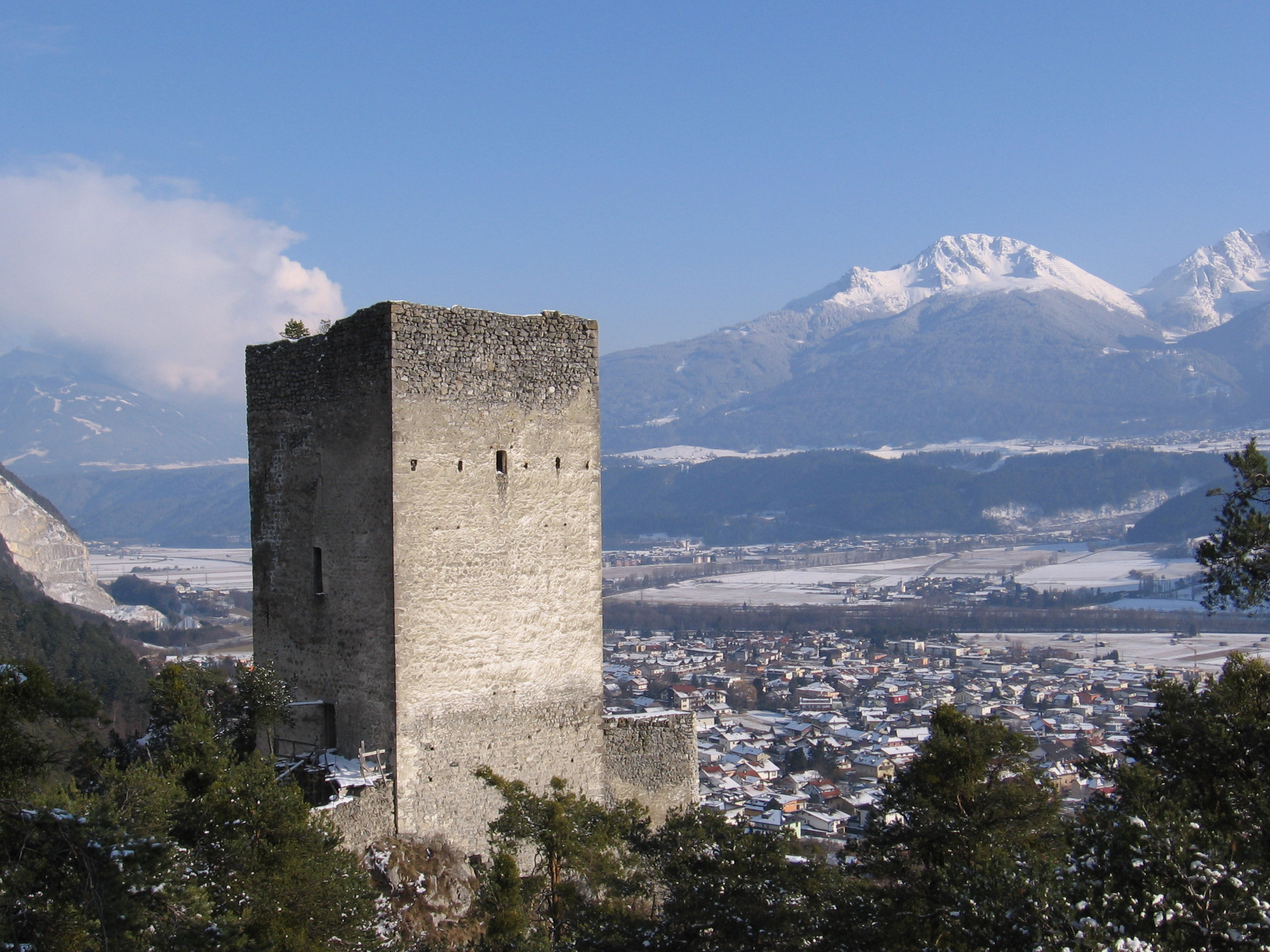 Burgruine Fragenstein, Zirl. Rechts hinten die Saile.